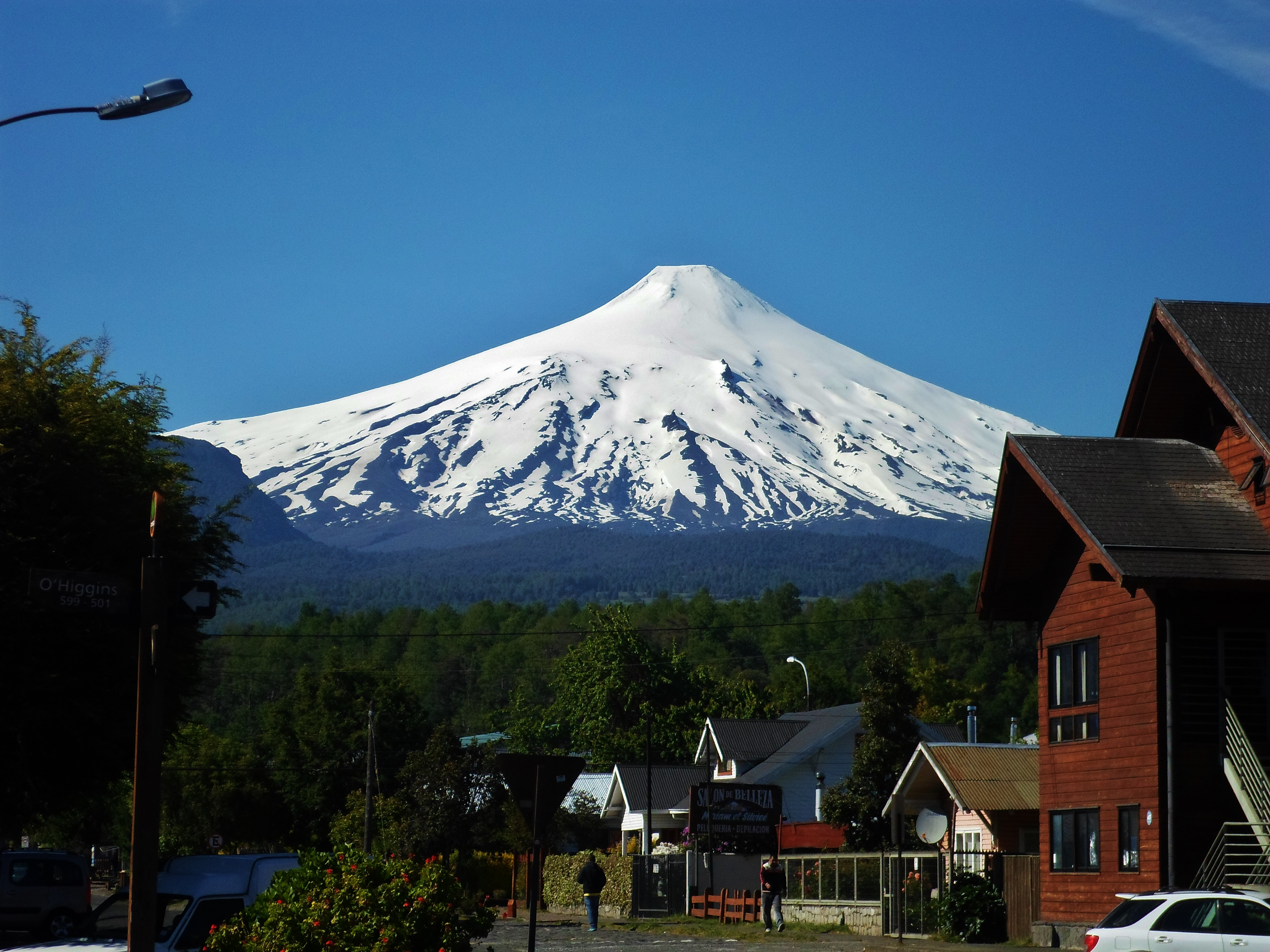 Volcan villarica desde la ciudad de pucon